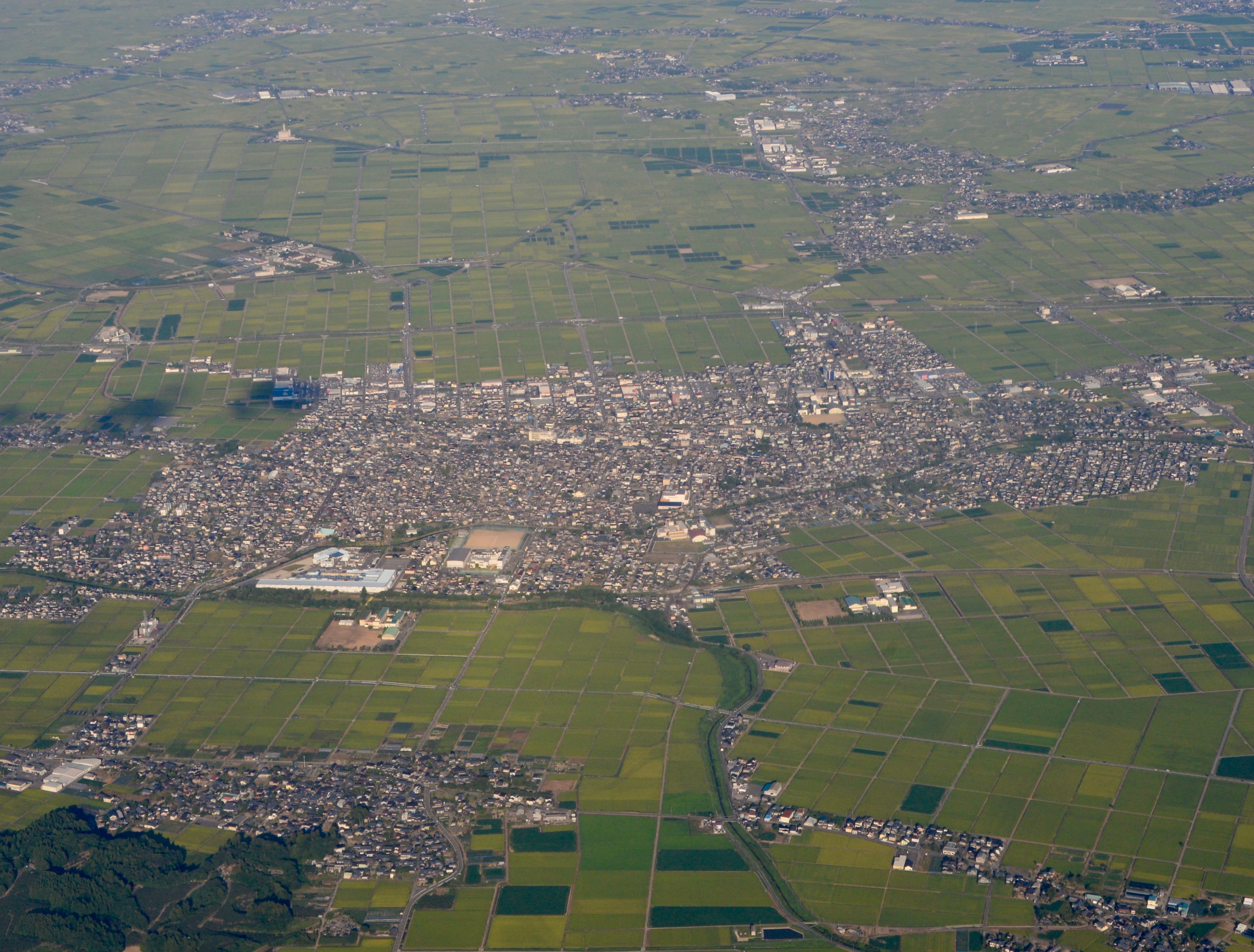 新潟市西蒲区巻地区